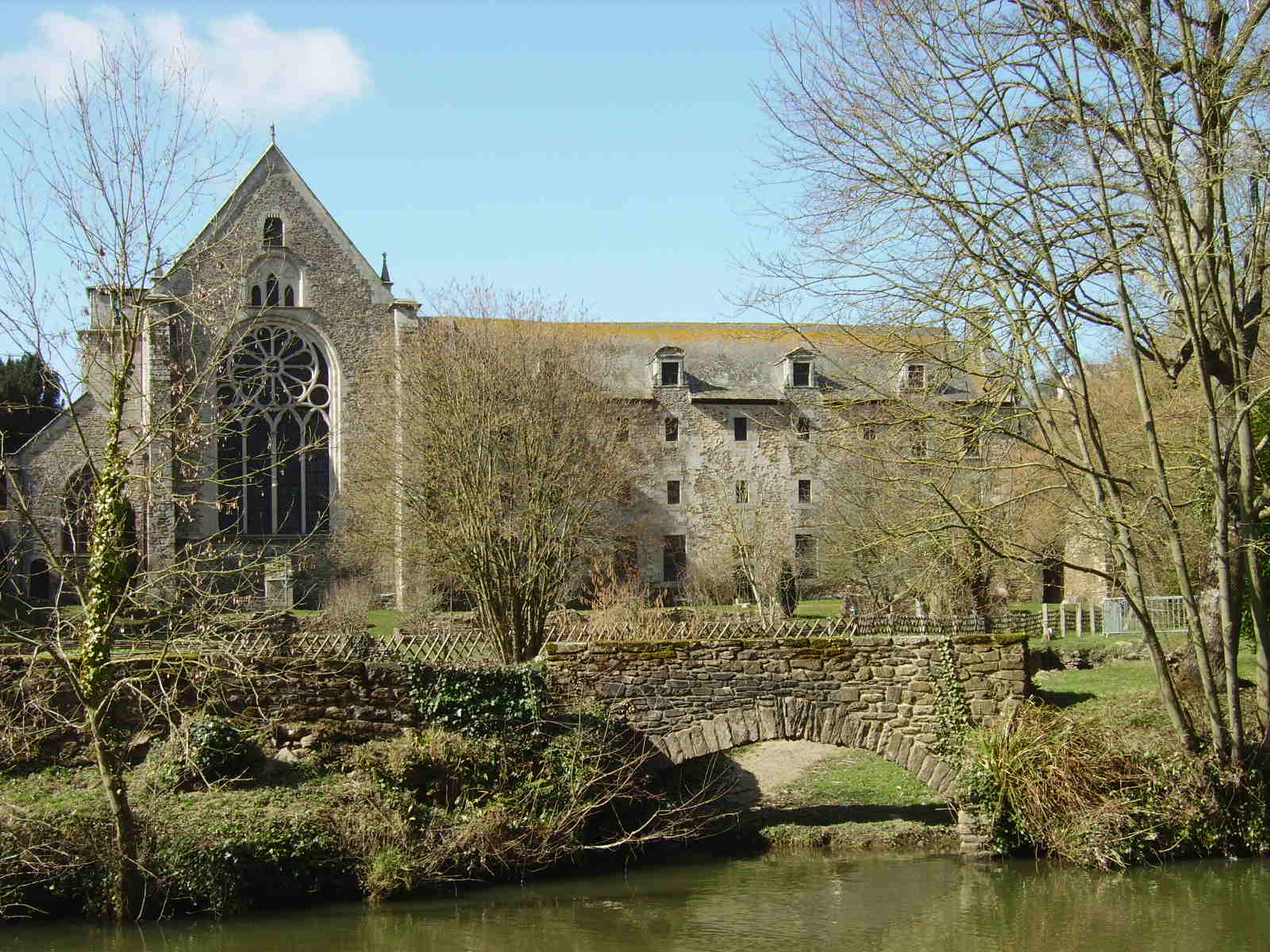 Monaĥejo de Léhon. Vidaĵo de la rivero Rance